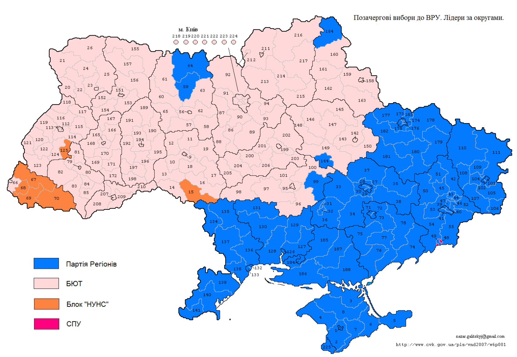 Україна.Позачергові парламентські вибори 2007. Лідери за округами.